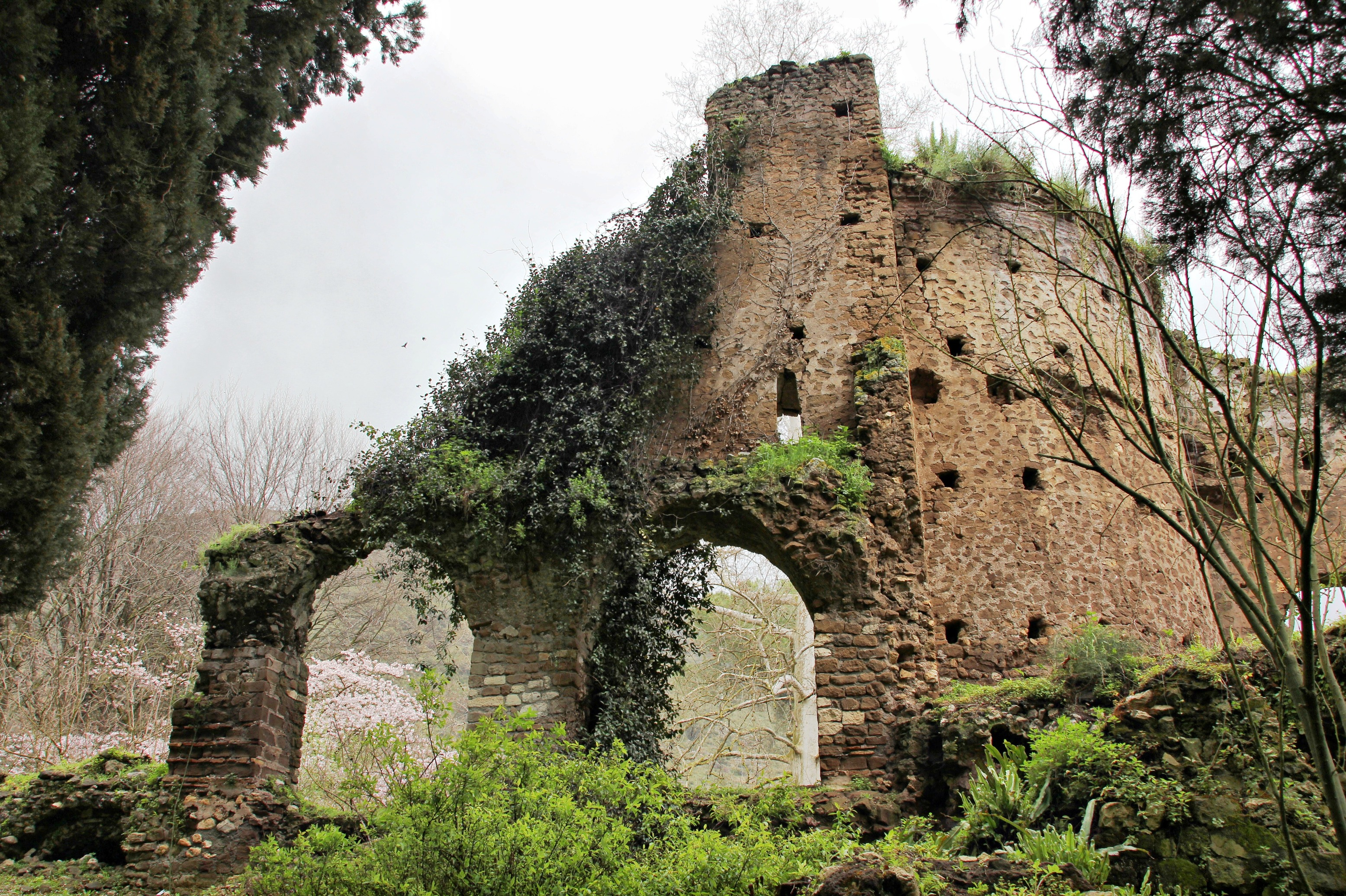 Giardino di Ninfa con i ruderi della città medievale This is a photo of a monument which is part of cultural heritage of Italy.